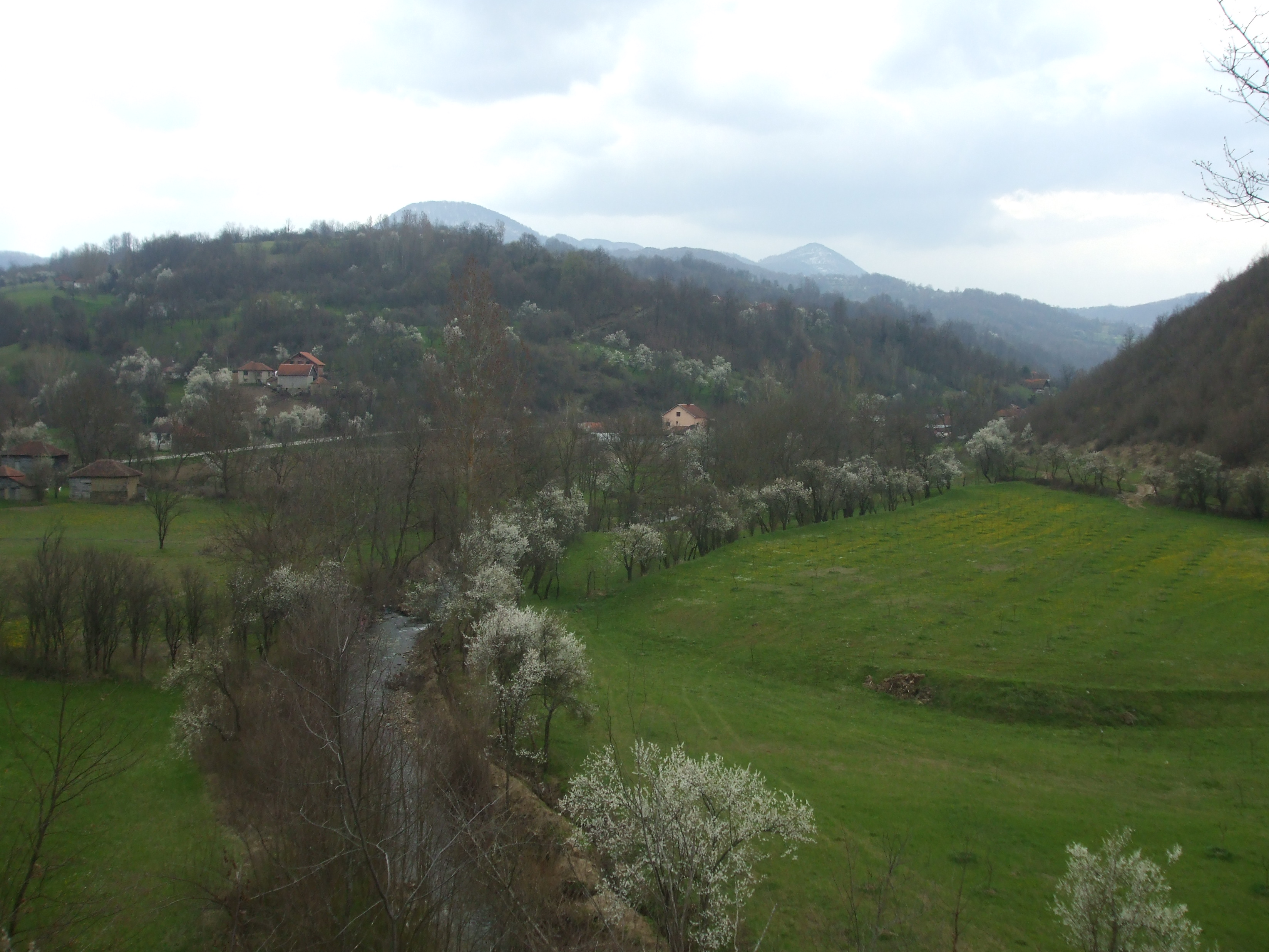 Поглед на Ушевце из Власа са локације Сирењарник. Снимио Драгољуб. У позадини се виде врхови Облик и Грот.